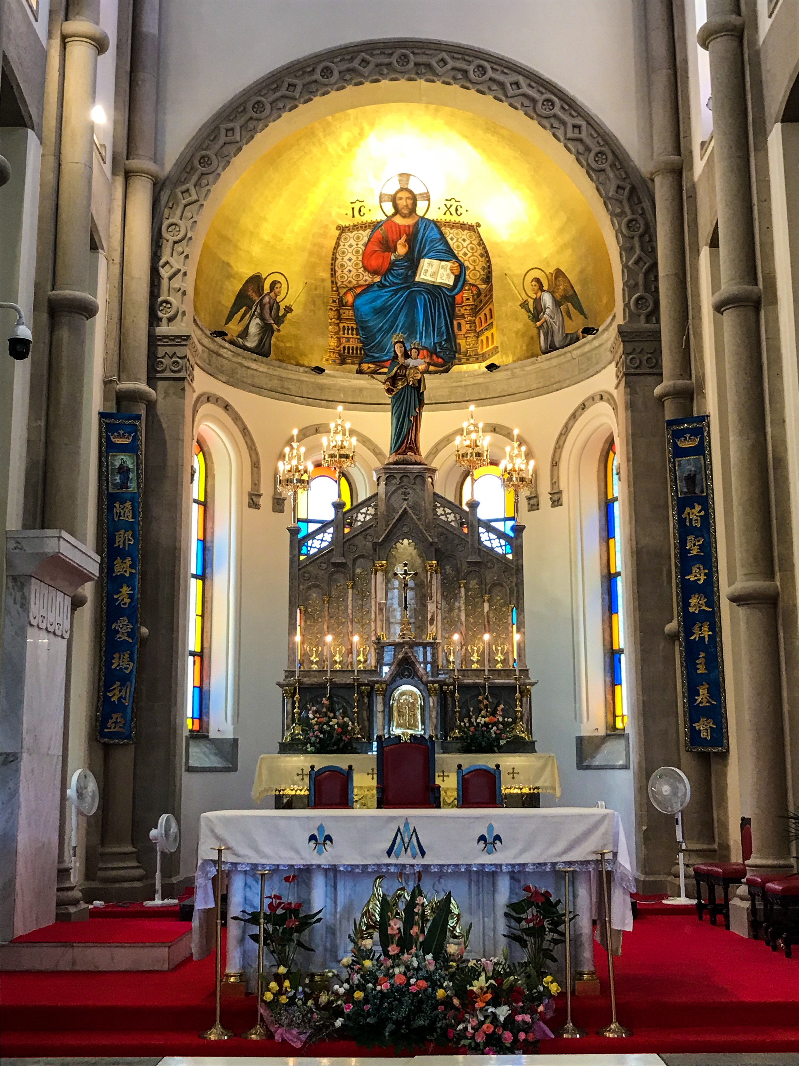 中文（中国大陆）: 佘山圣母大堂祭台